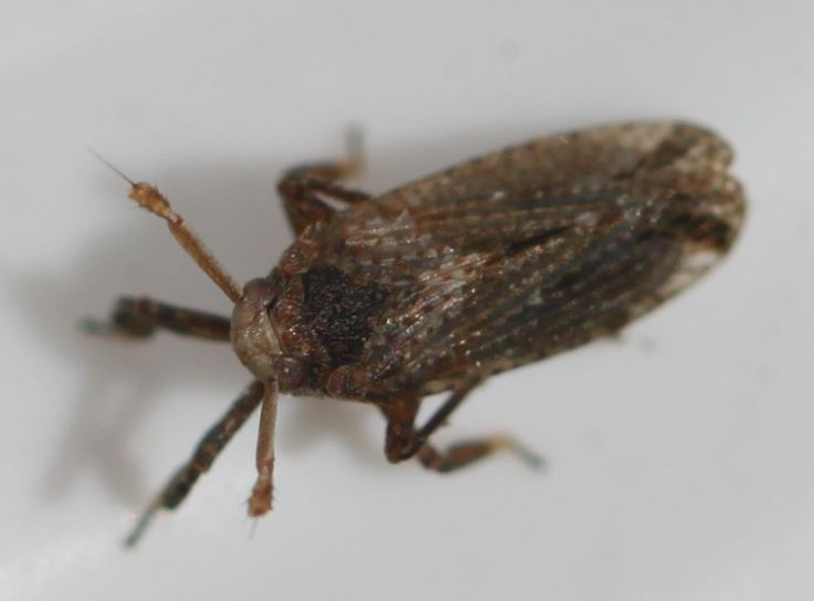 Schaufel-Spornzikade (Asiraca clavicornis) am 6. April 2018 in Walldorf/Baden